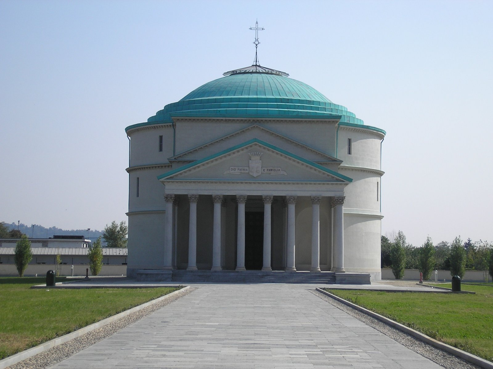 Mausoleo della "Bela Rosìn" (Rosa Vercellana), moglie morganatica di re Vittorio Emanuele II, Torino. Fotografia scattata da Andrea Ferrero il 1 ottobre 2005.